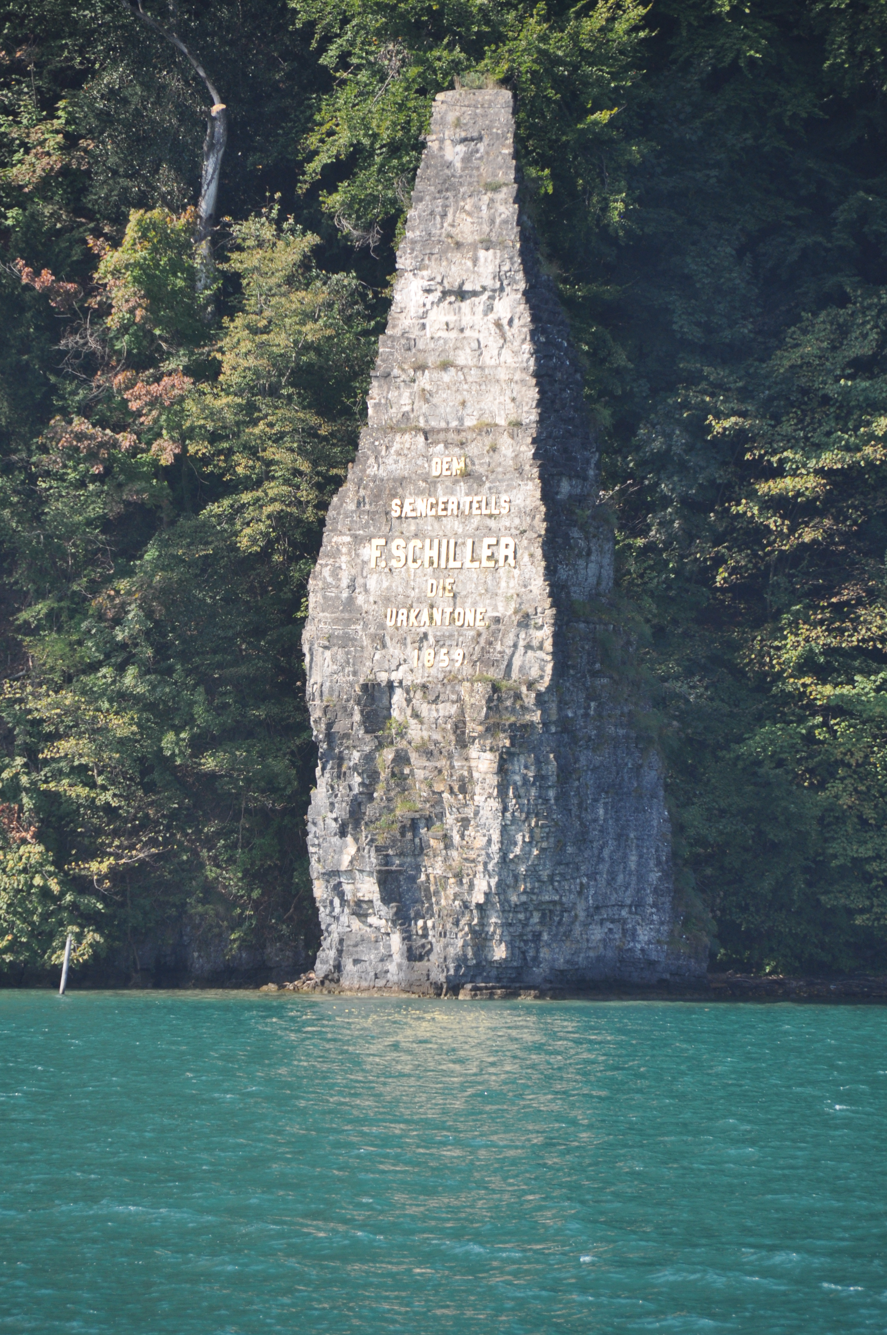 Pierre de Schiller